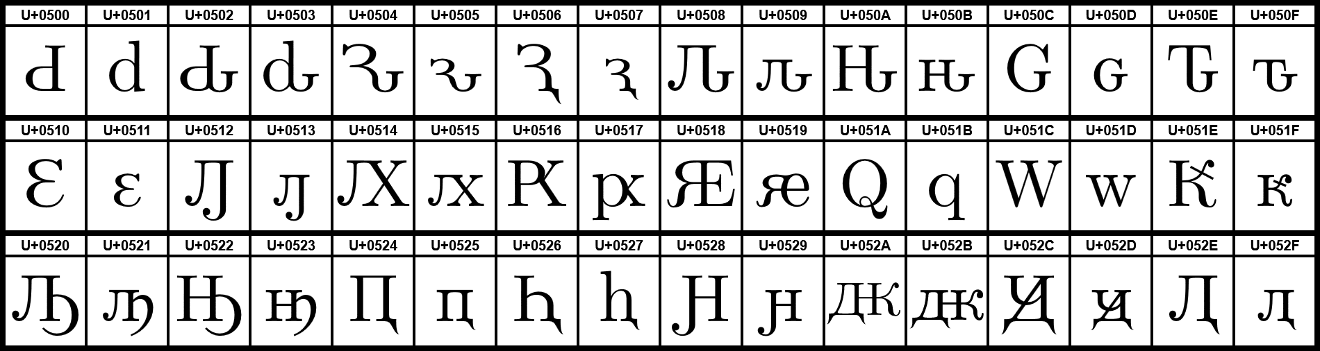 Grafiktafel für den Unicodeblock Kyrillisch, Ergänzung. Schraffierte Felder sind unbesetzte Codepoints.